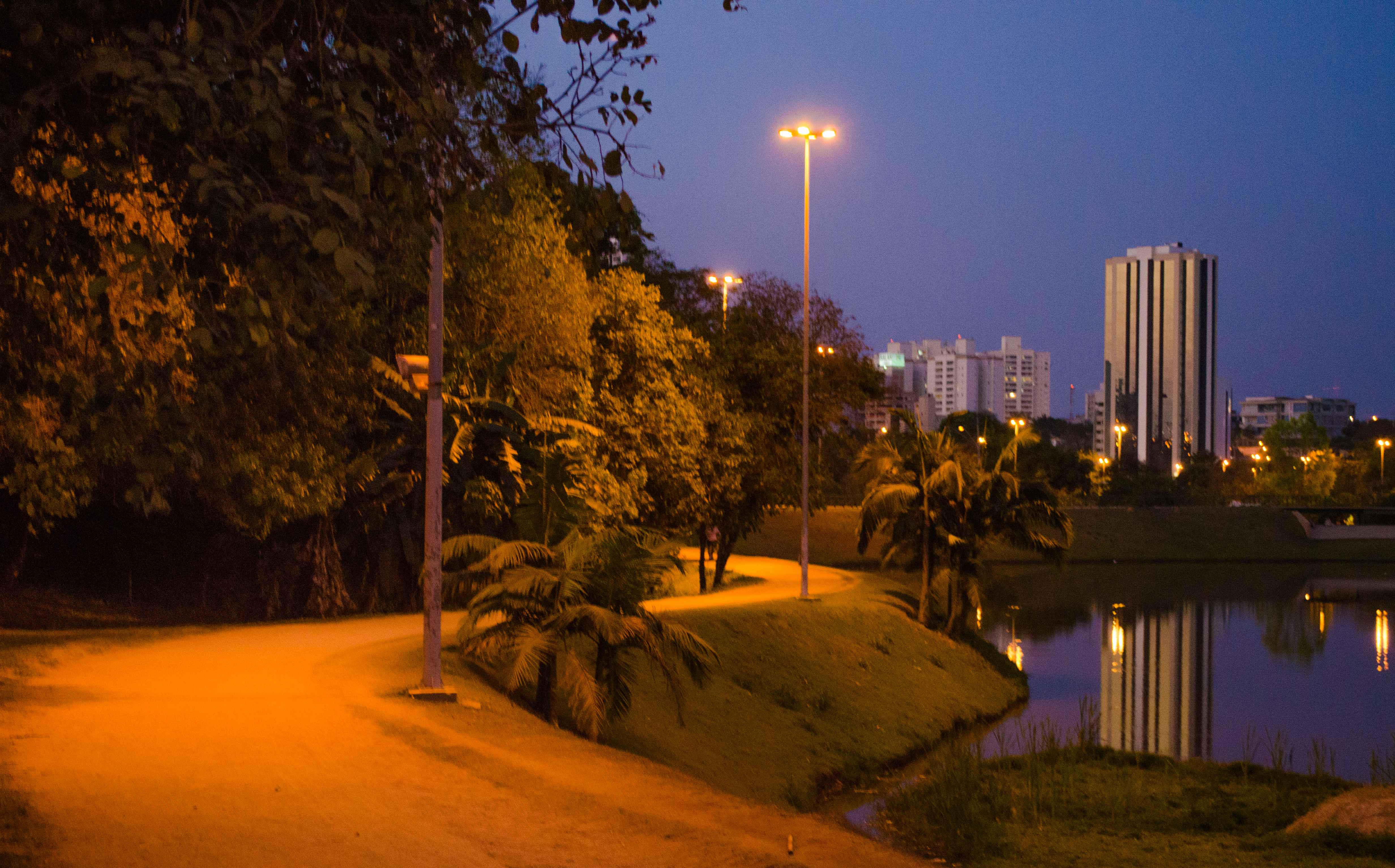 Sorocaba, bairro Campolim